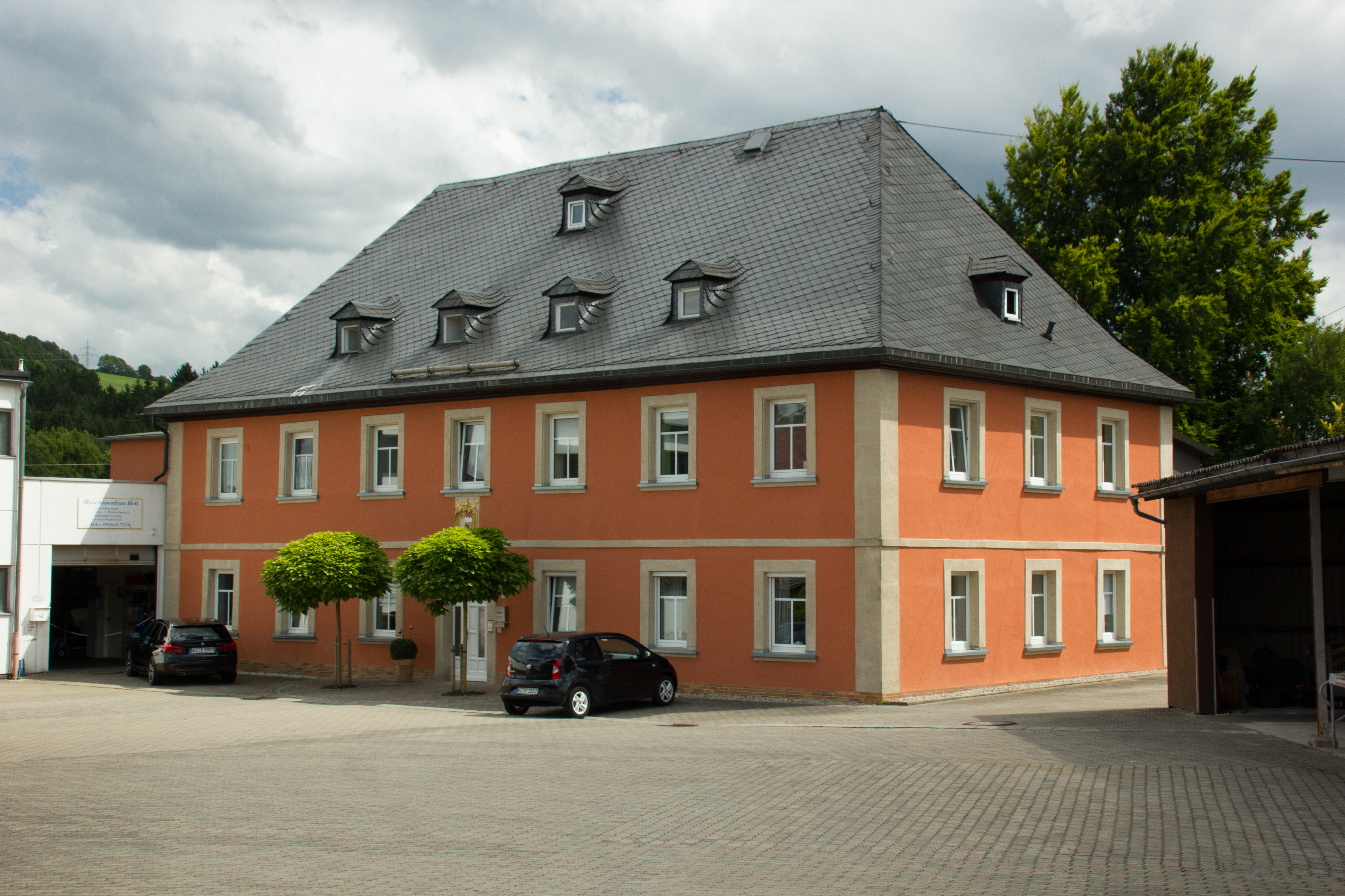 Burgstraße 6, Rothenkirchen